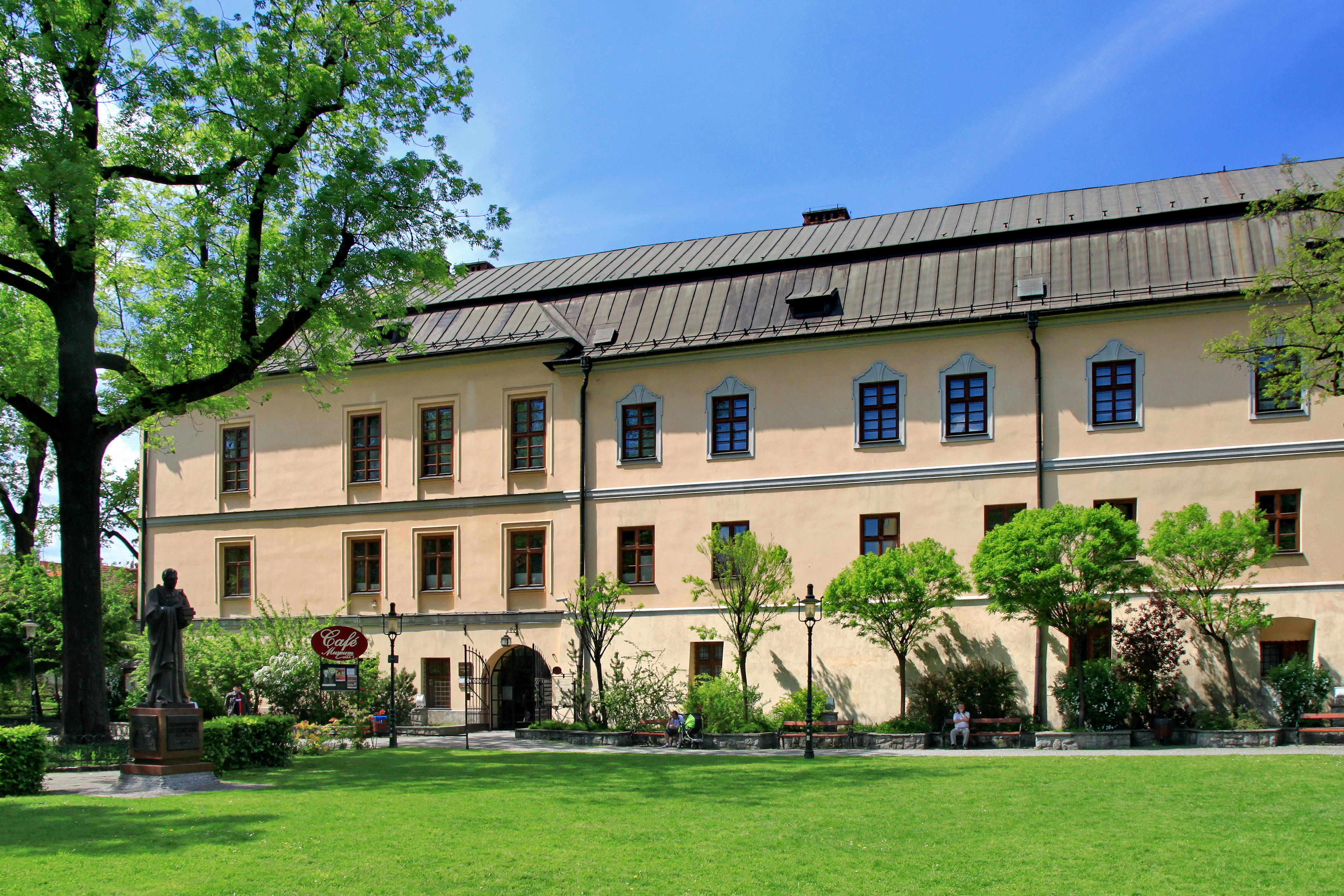 Cieszyn, pałac Larischów, ob. Muzeum Śląska Cieszyńskiego, 1790-96, XIX/XX w., 1934, 1990